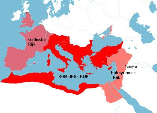 Het Imperium Romanum in 271 n.Chr., voor de herovering van de gebieden verloren aan het Palmyreense Rijk en het Gallische keizerrijk door Aurelianus.